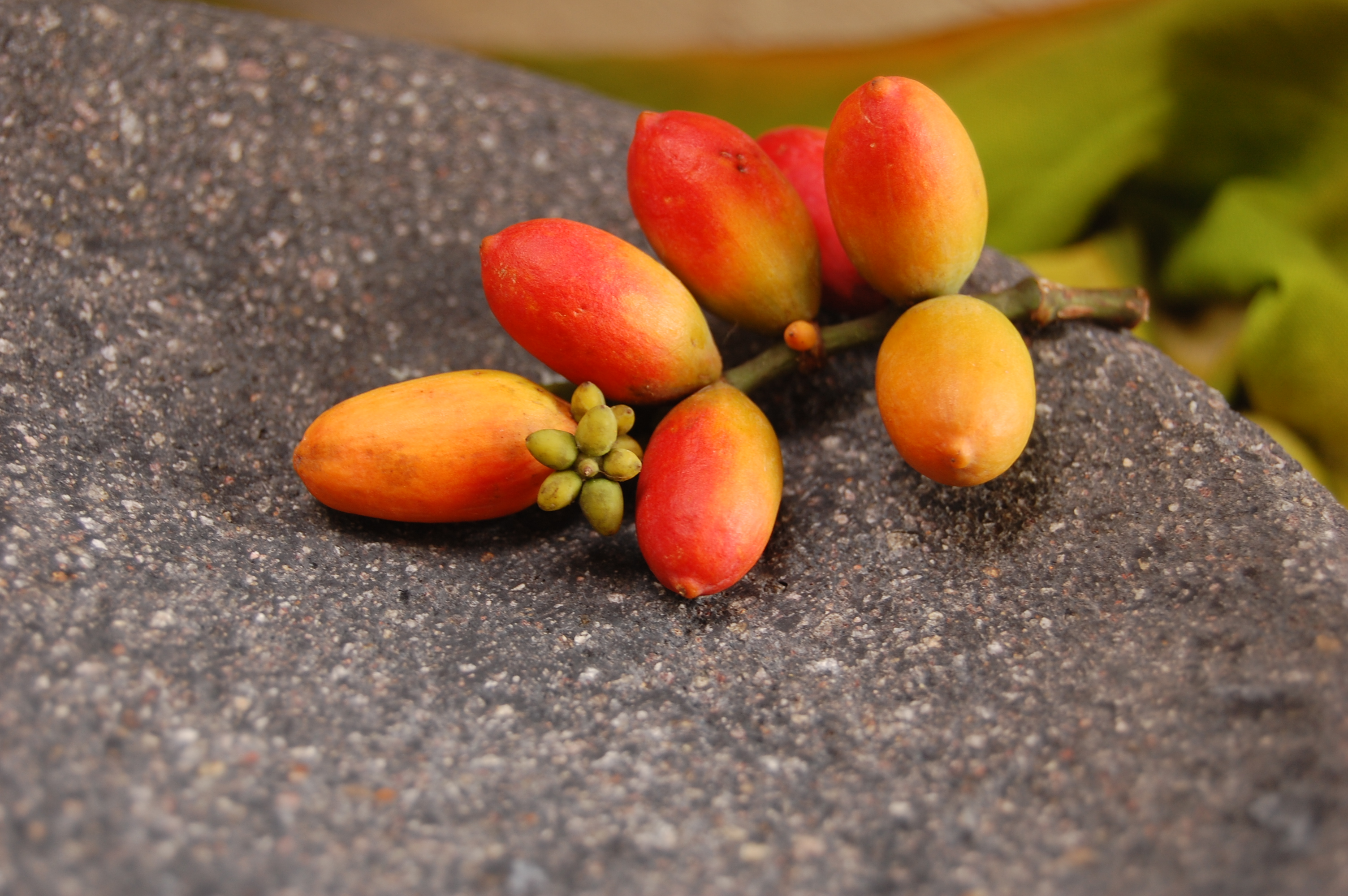 Melinjo Basa Sunda: Tangkil